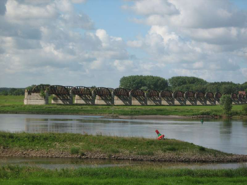 Eisenbahnbrücke Dömitz, am linken Elbeufer, von Dömitz aus fotografiert.